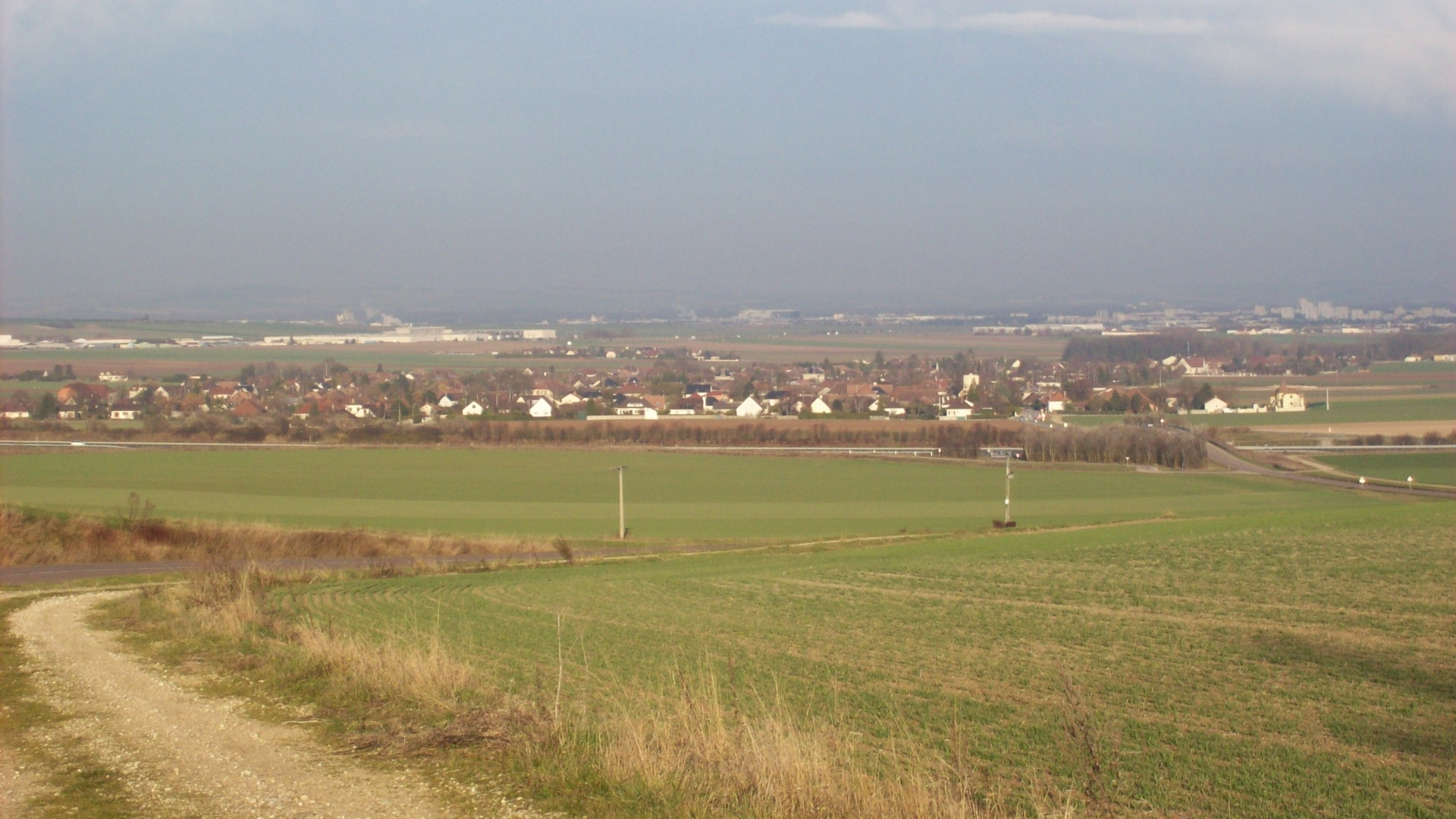 Vue de Torvilliers à haute altitude